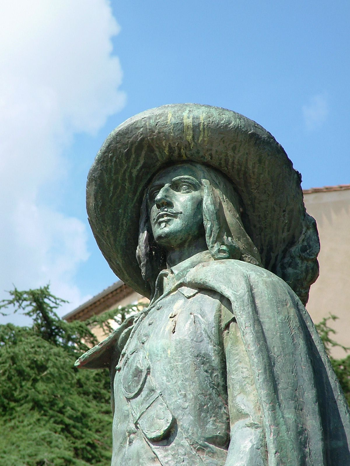 Statue de d'Artagnan à Auch (Gers, France).